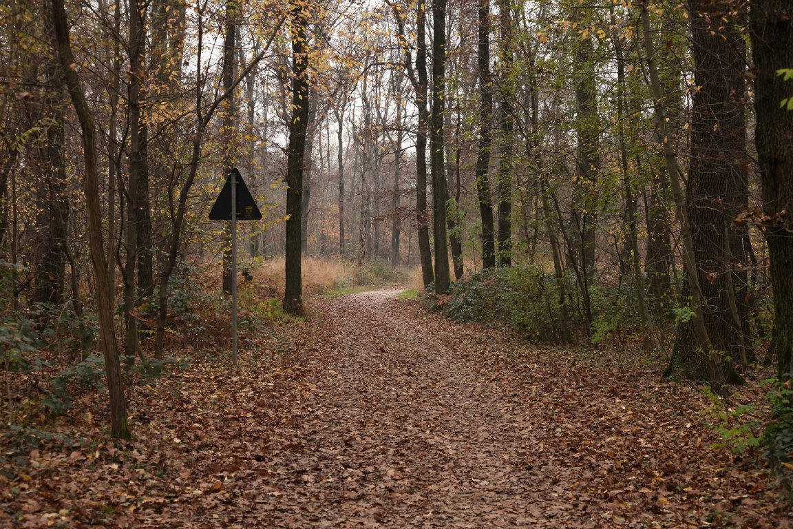 Parco Groane 11/2010